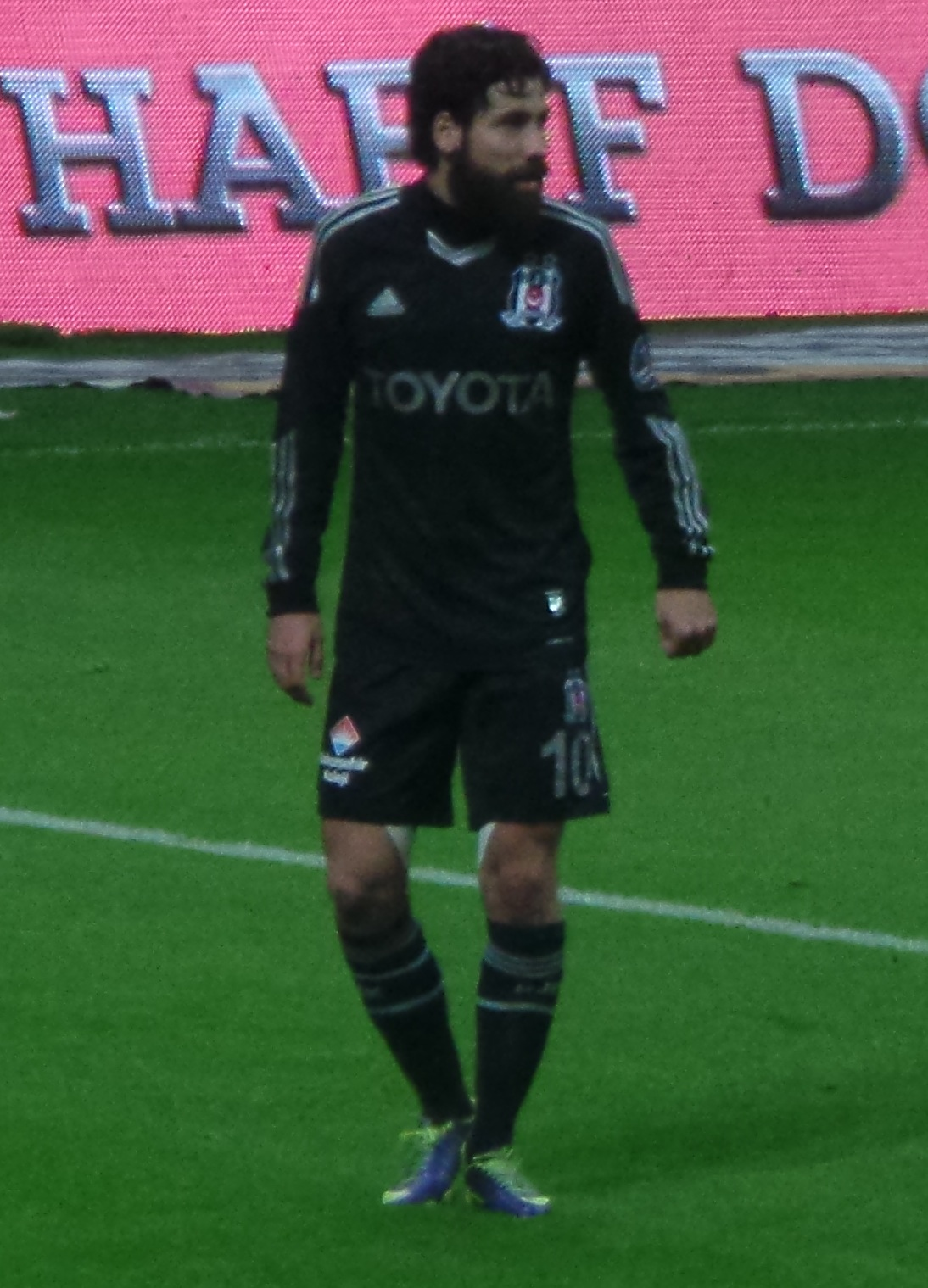 Olcay Şahan'13-14